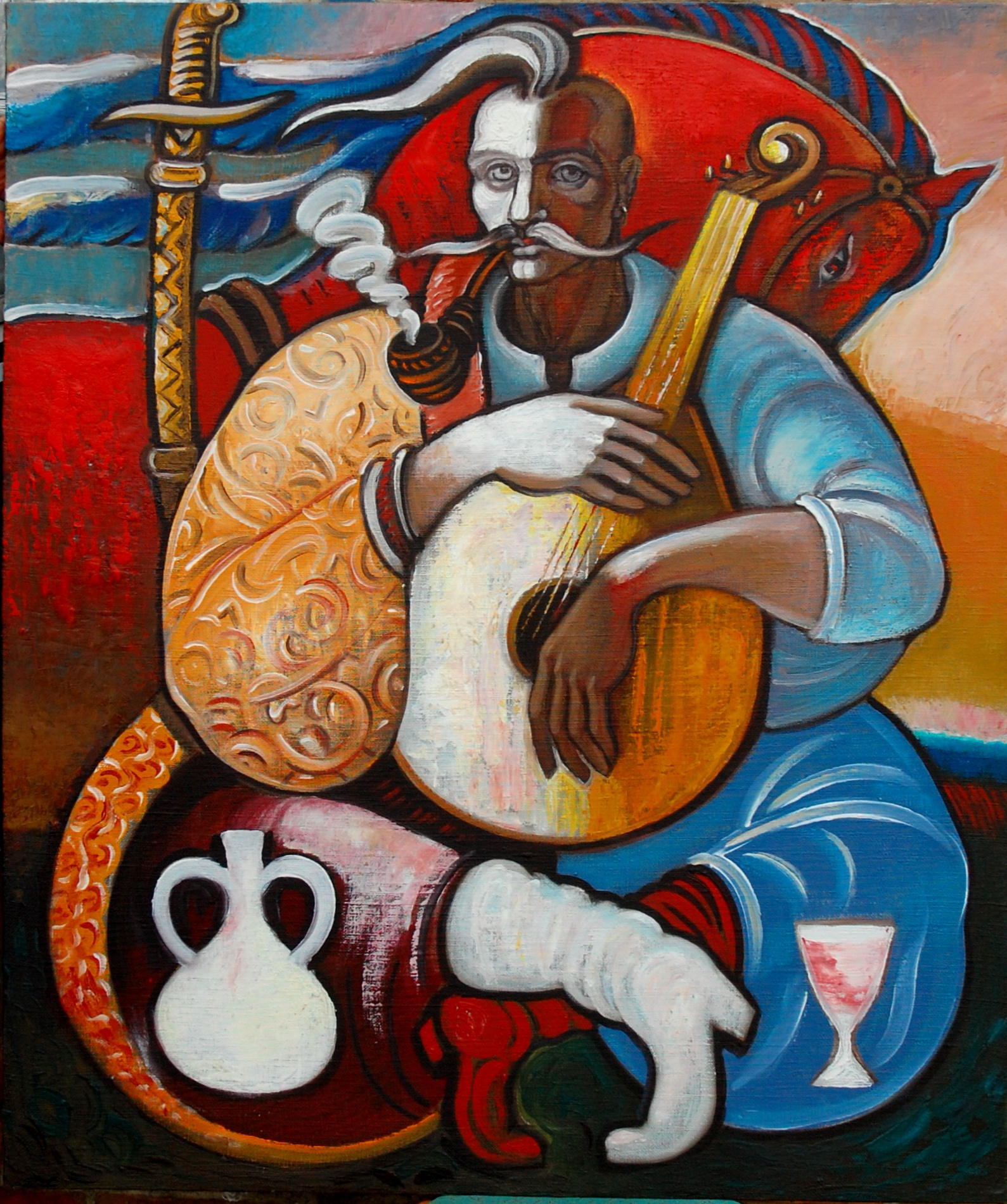 Фото картини Віктора Цапка "Козак Мамай", 2014 р.